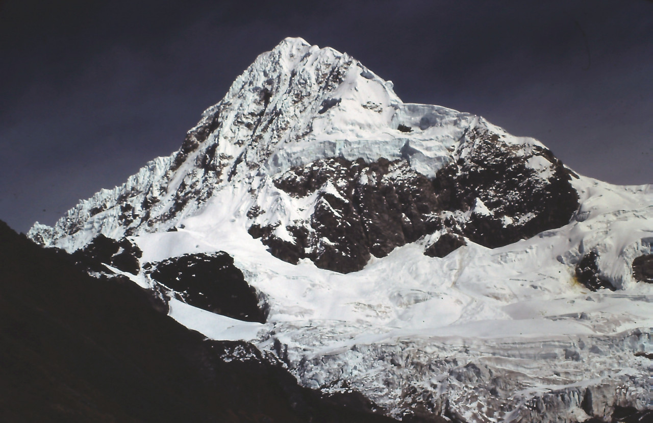 El Salcantay y su cara Este visto desde la campo Base de Palcay. por la cara Este sube la ruta Eslovena (1978) y por la arista NE (a la derecha) la ruta Alemana Kasparrek-Mazenauer. (foto: Jesús Mª Rodríguez Pozo)